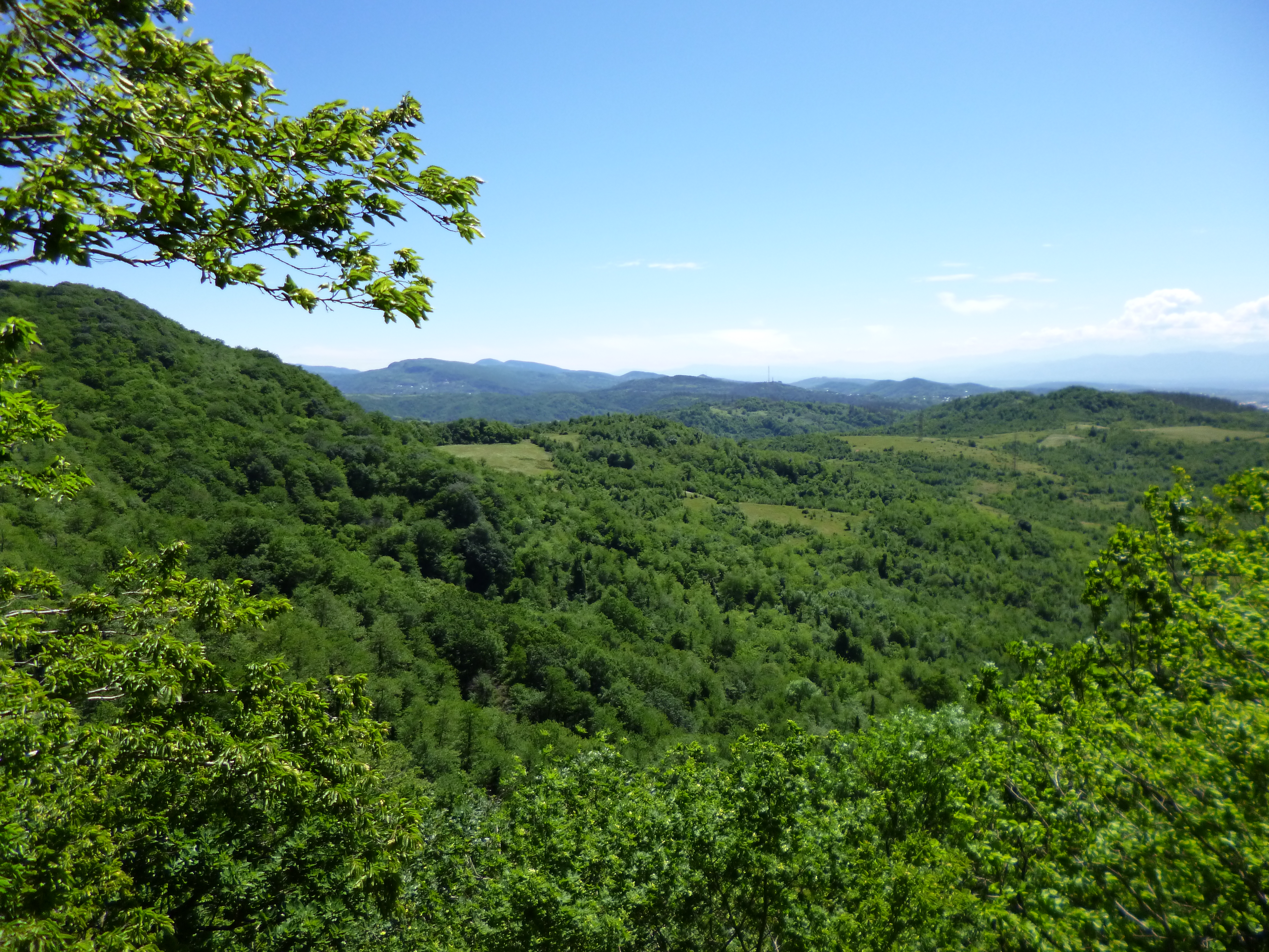 P1000737 Sataplia